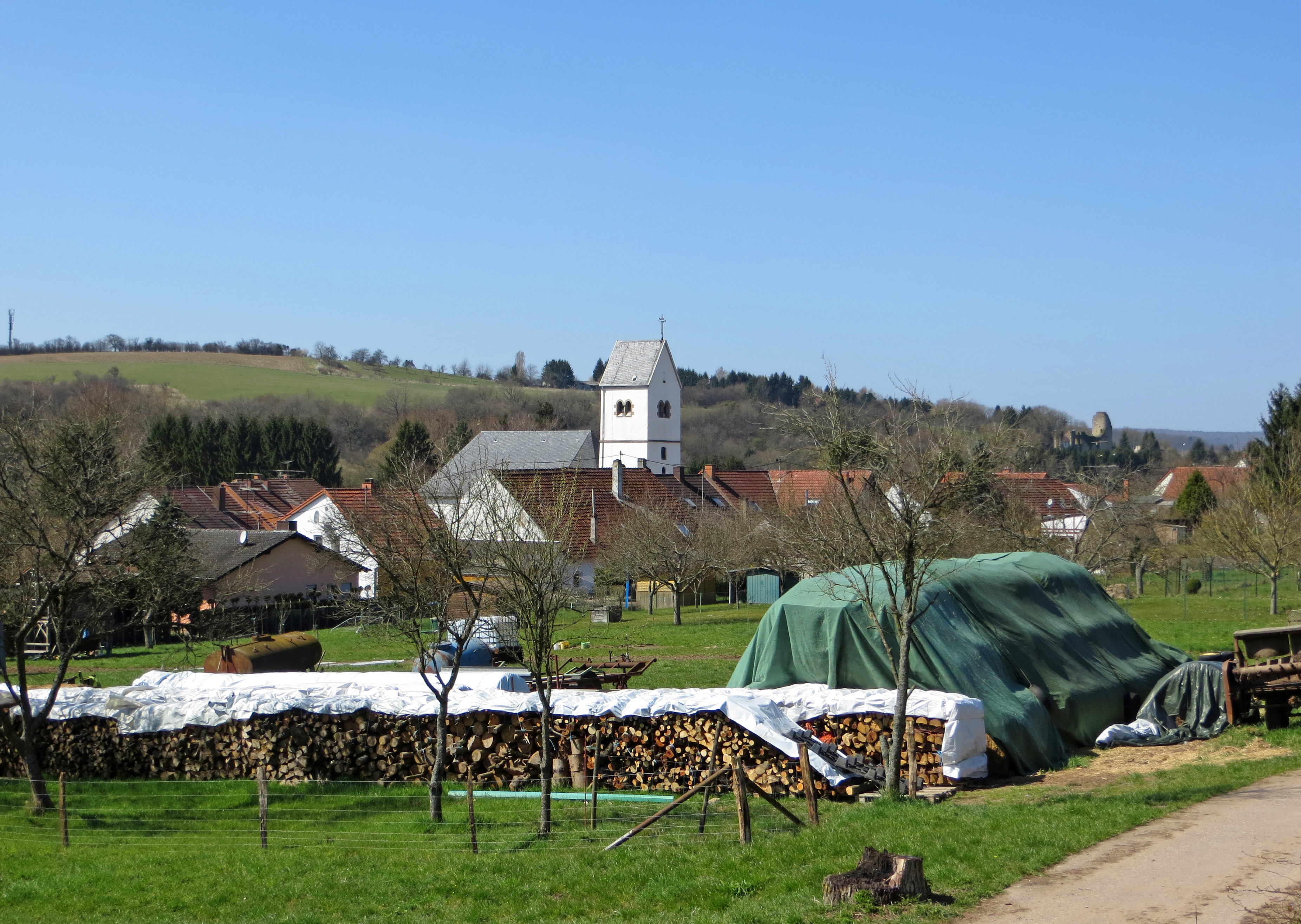 Blick aus südöstlicher Richtung auf Habkirchen, Gemeinde Mandelbachtal, Saarpfalz-Kreis, Saarland